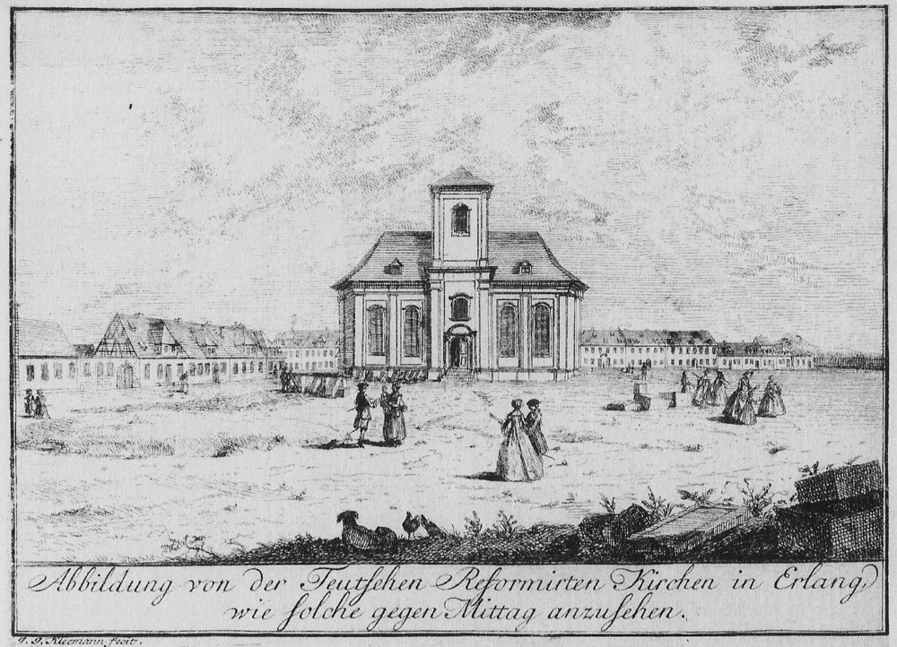 Originale Bildunterschrift: Abbildung von der Teutschen Reformirten Kirchen in Erlang, wie solche gegen Mittag [= Norden] anzusehen. Die von 1728 bis 1734 erbaute Deutsch-reformierte Kirche am heutigen Bohlenplatz 1 galt als elegantester Sakralbau Erlangens. 1922 wurde das Gebäude von der Evangelisch-lutherischen Kirchengemeinde gekauft und in Christuskirche umbenannt. 1953 wurde das Kirchengebäude in ein Gemeindehaus umgebaut, wobei durch den Einbau einer Zwischendecke der ursprüngliche Innenraum zerstört wurde. Die Orgel fand in der 1954 bis 1955 erbauten Markuskirche im Erlanger Stadtdteil Sieglitzhof einen neuen Standort.